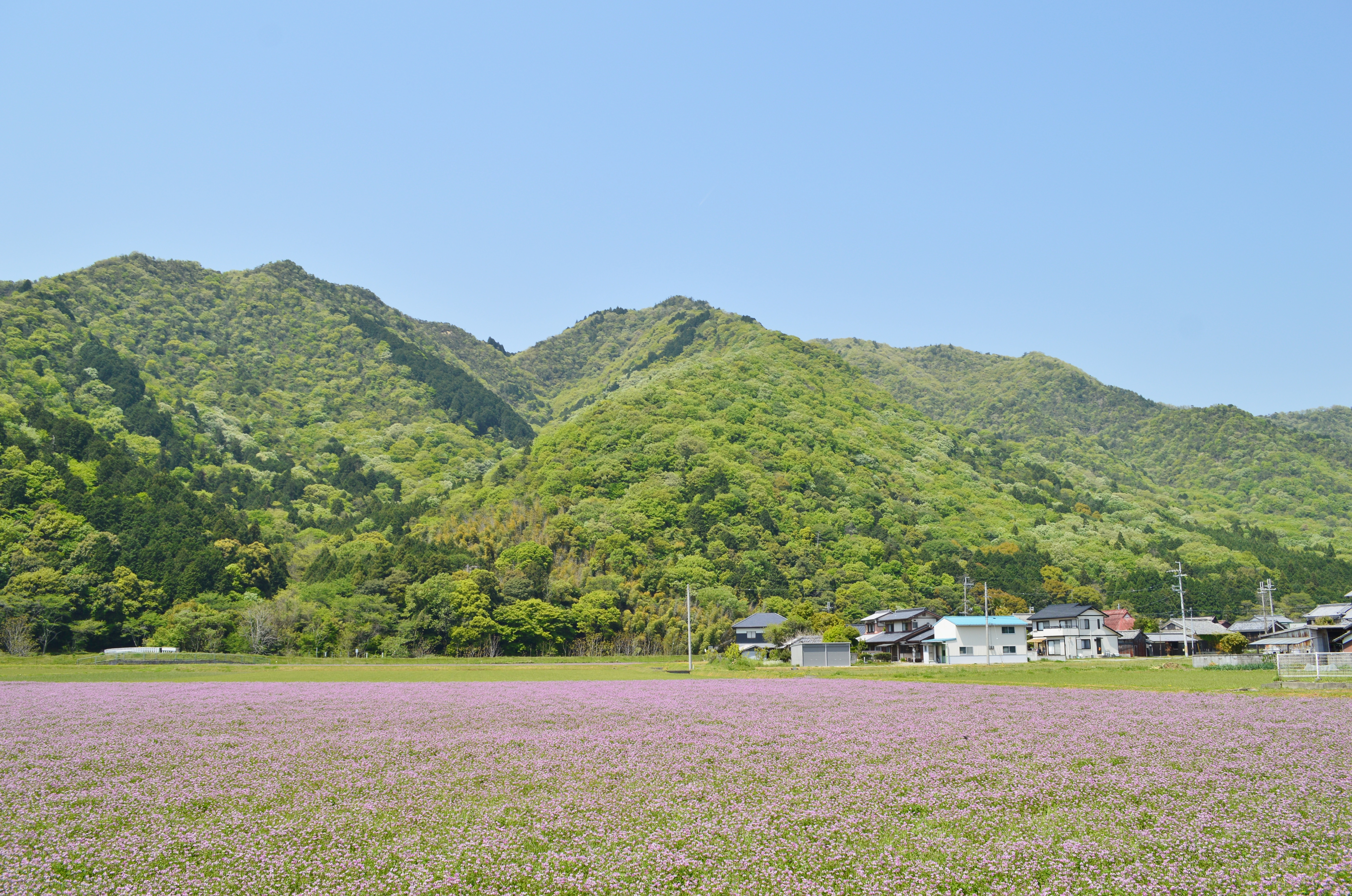 亀山（城山）の山容